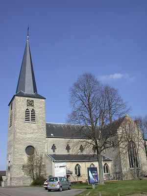 St. Monulphuskerk te Berg, Limburg, Nederland